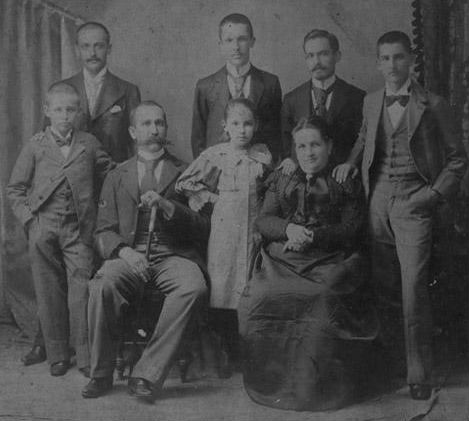 Familia Rengifo Borrero. En la parte de atrás: Ricardo, Gonzalo, Ignacio y Pio Rengifo Martínez. Adelante: José, Ricardo y Mercedes Rengifo Martínez, Mercedes Rengifo, Erminia Borrero de Rengifo. Buenaventura,1895.